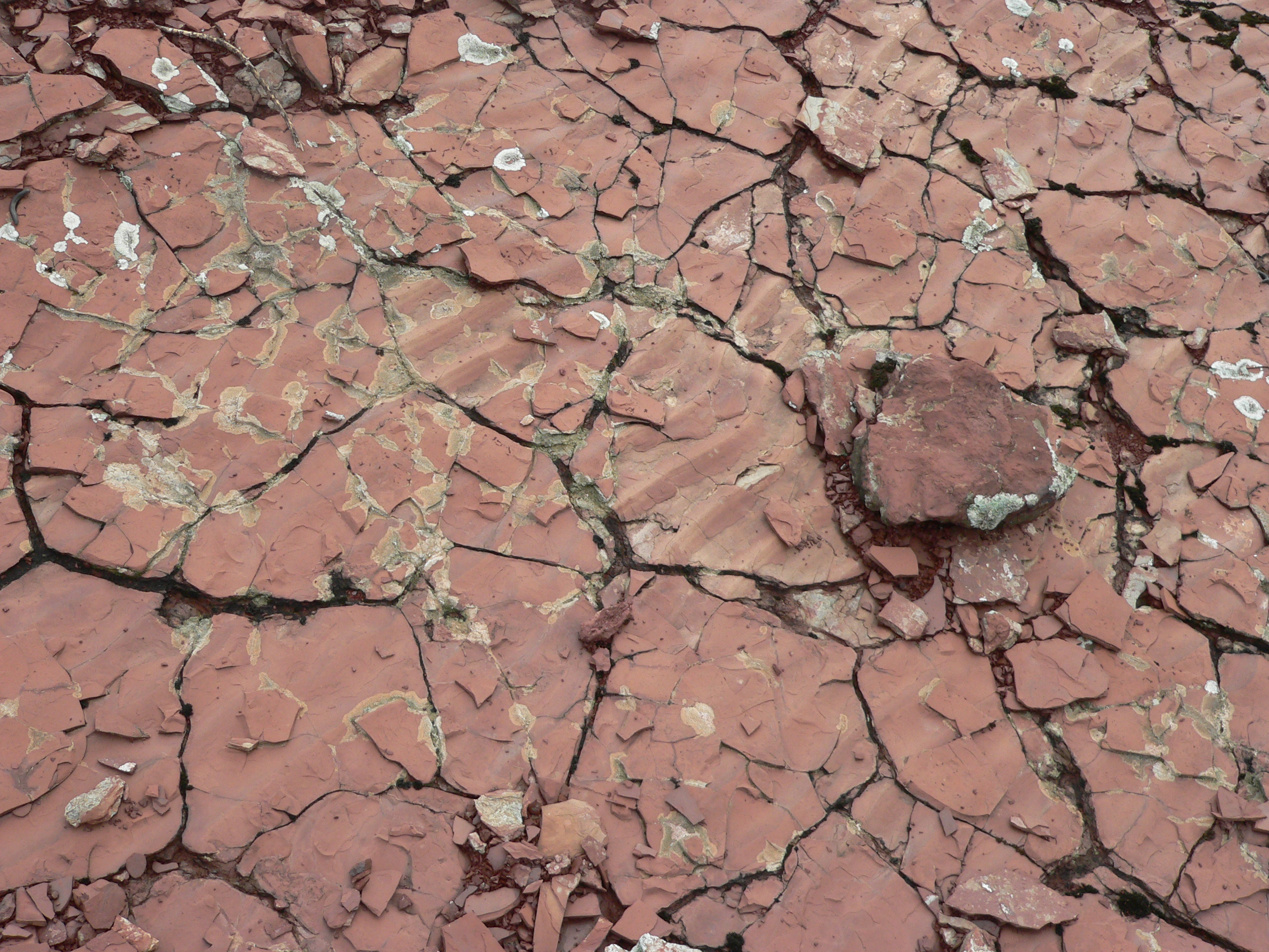 Lac de Salagou: Permian ripple marks